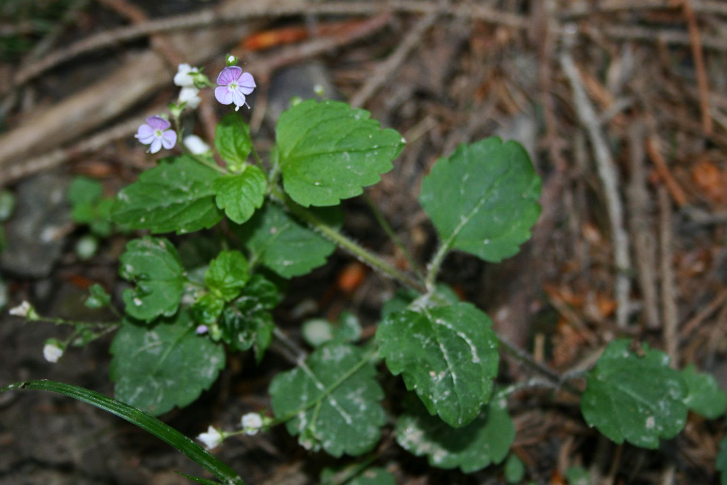 Berg-Ehrenpreis (Veronica montana), Wegerichgewächse (Plantaginaceae) – Österreich/Austria/Autriche: Oberösterreich, Salzkammergut, Höllengebirge, Sattel W Hohe Lueg, ca. 940 m